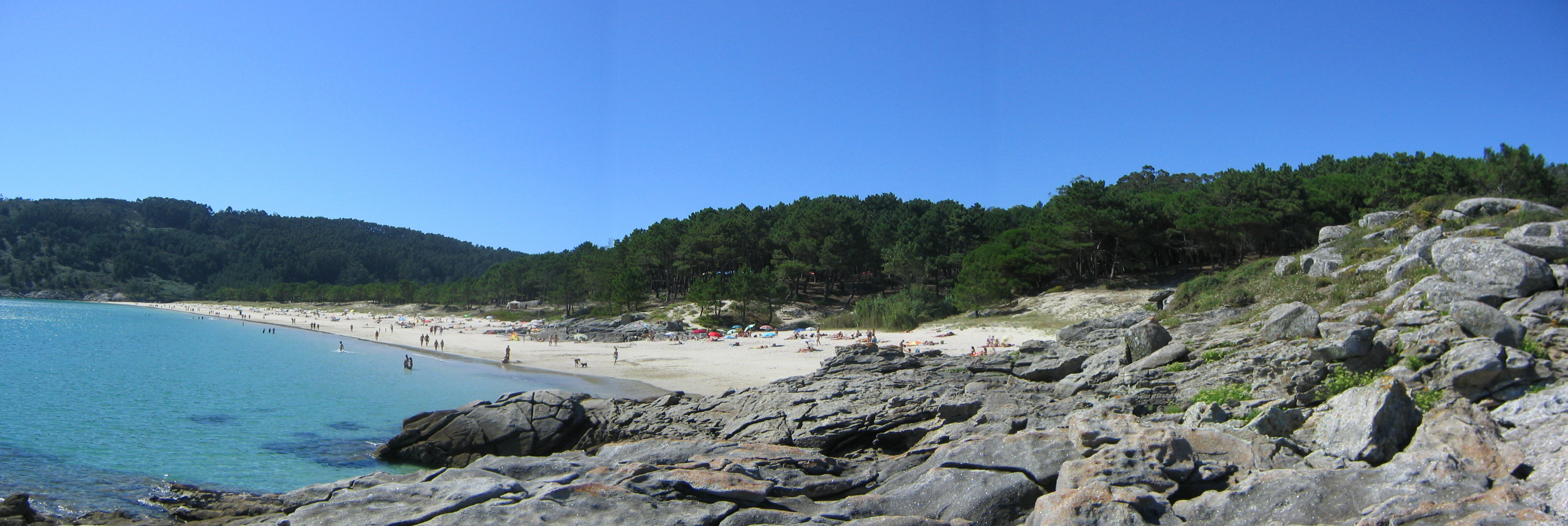 Cangas do Morrazo, playa de Barra. Pontevedra Galicia España